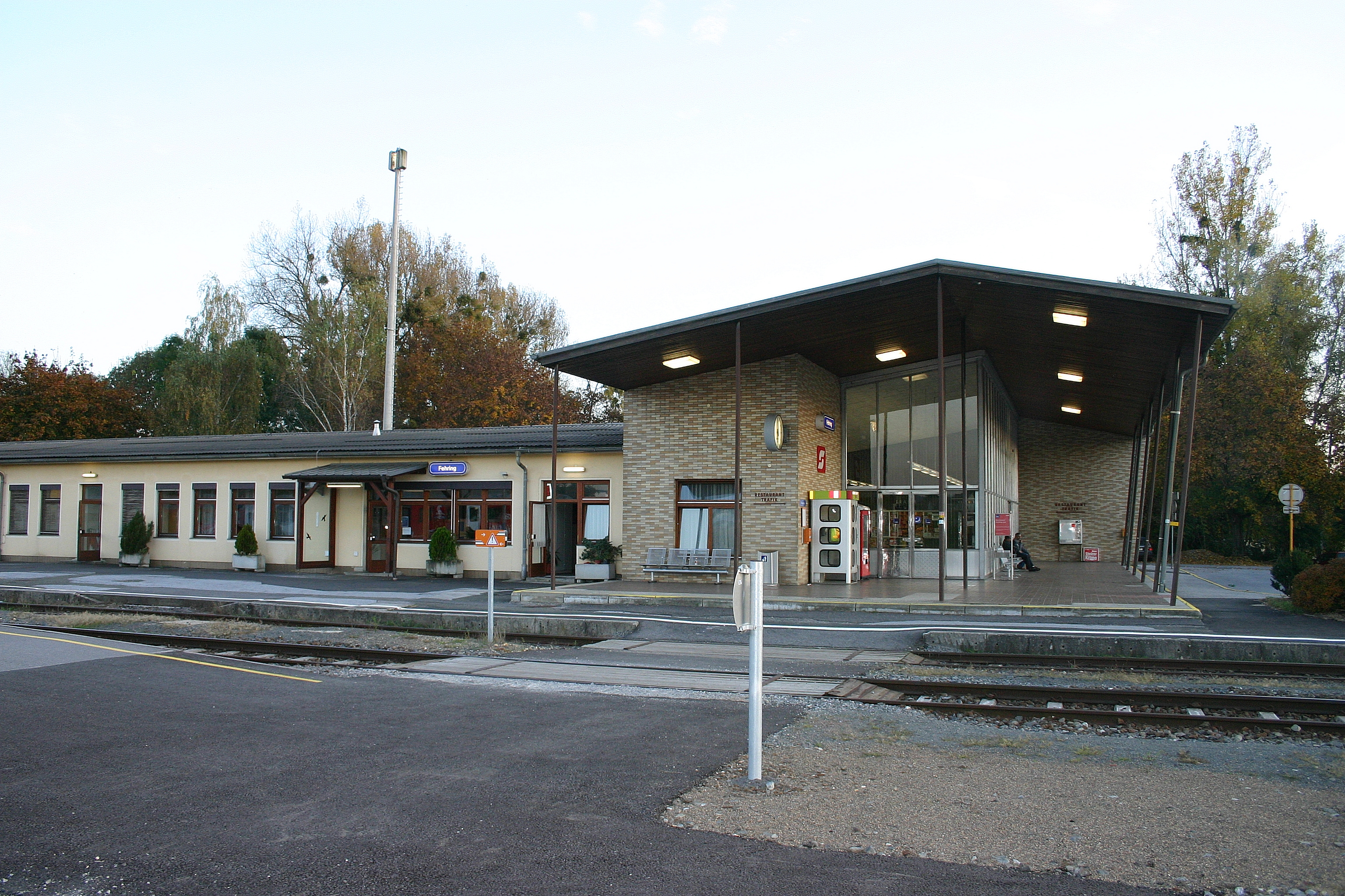 Fehring – Bahnhof der Steirischen Ostbahn und Abzweigbahnhof der Thermenbahn, Bahnhofsgebäude